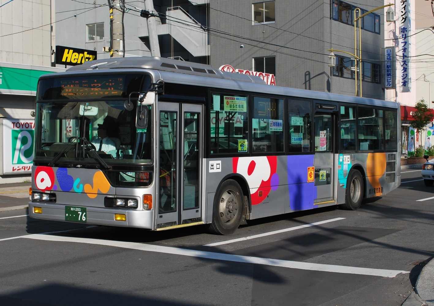 旭川電気軌道76号車 北海道旭川市旭川駅近隣の公道上で撮影